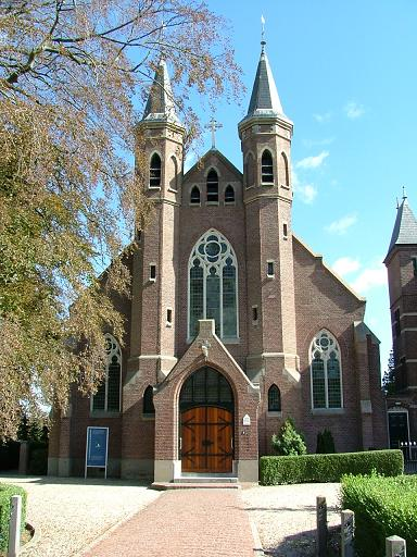 Parochiekerk H. Blasius Heinkenszand